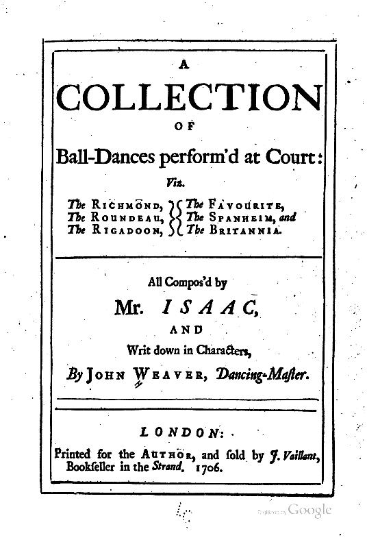 Title page of A collection of ball-dances perform'd at court